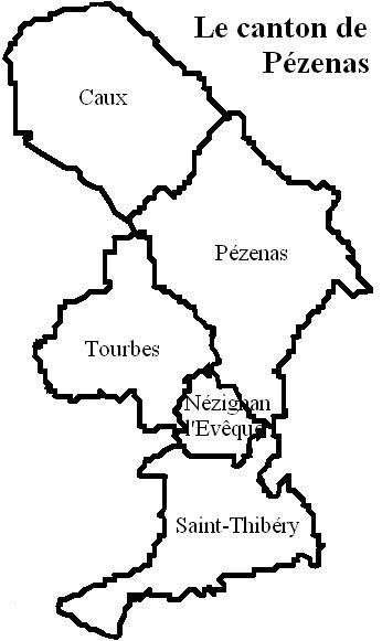 Le canton de Pézenas Image personnelle